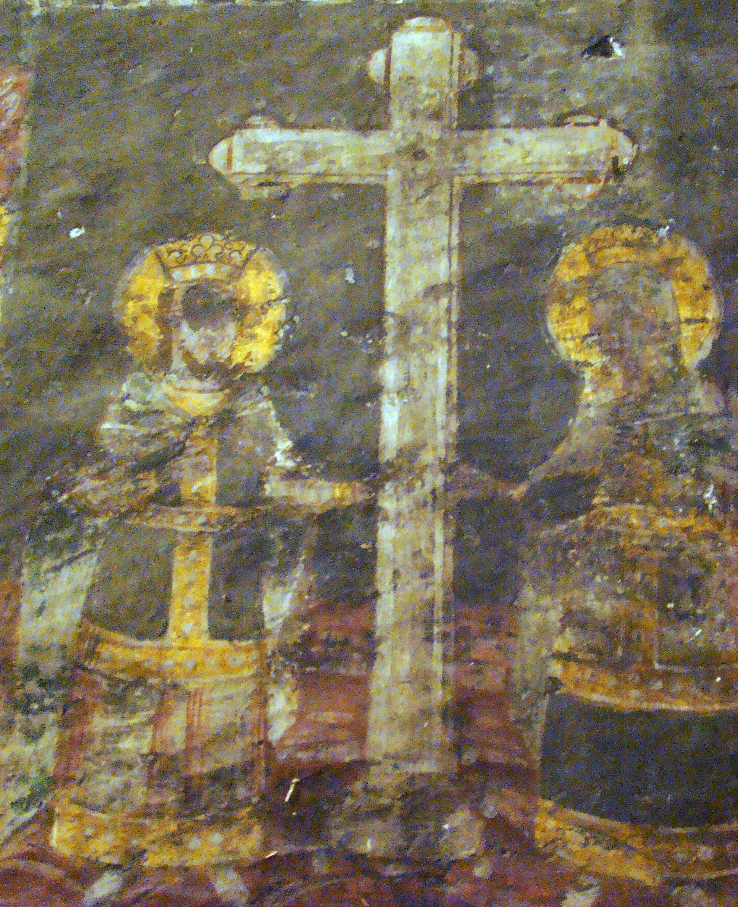 Biserica „Sfântul Nicolae” din Leșnic, județul Hunedoara